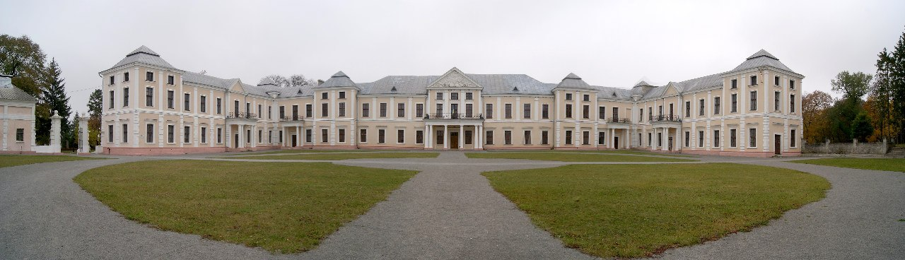 Вишнівецький замковий палац